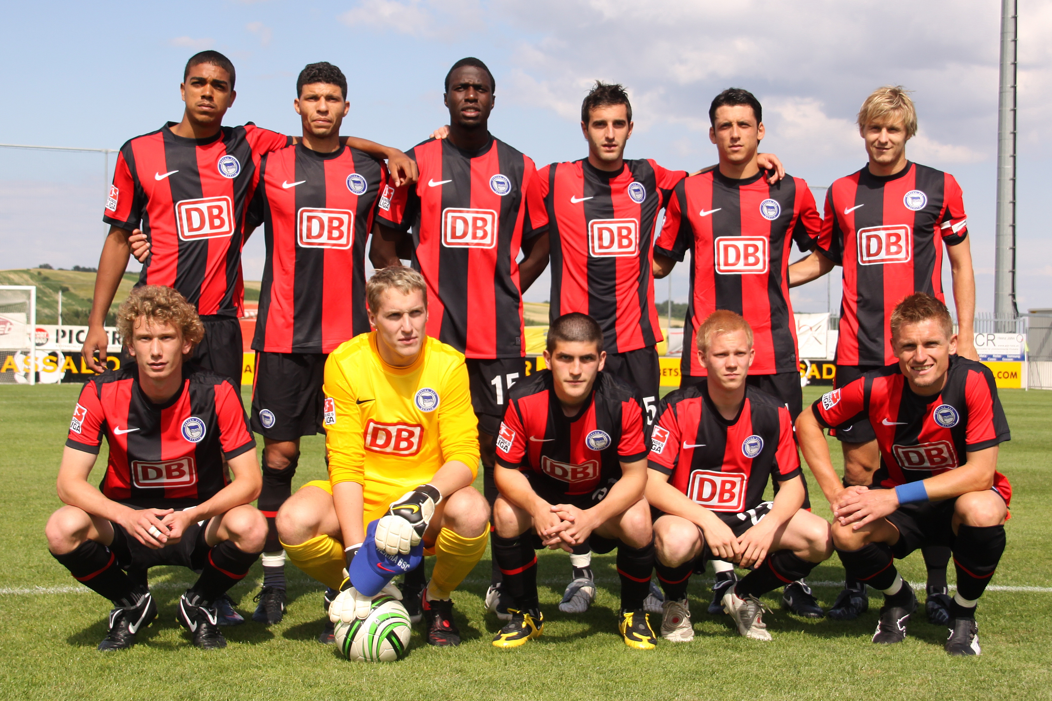 Mannschaftsfoto Hertha BSC Berlin im Vorbereitungsspiel gegen den SC Magna Wiener Neustadt im Sonnenseestadion Ritzing